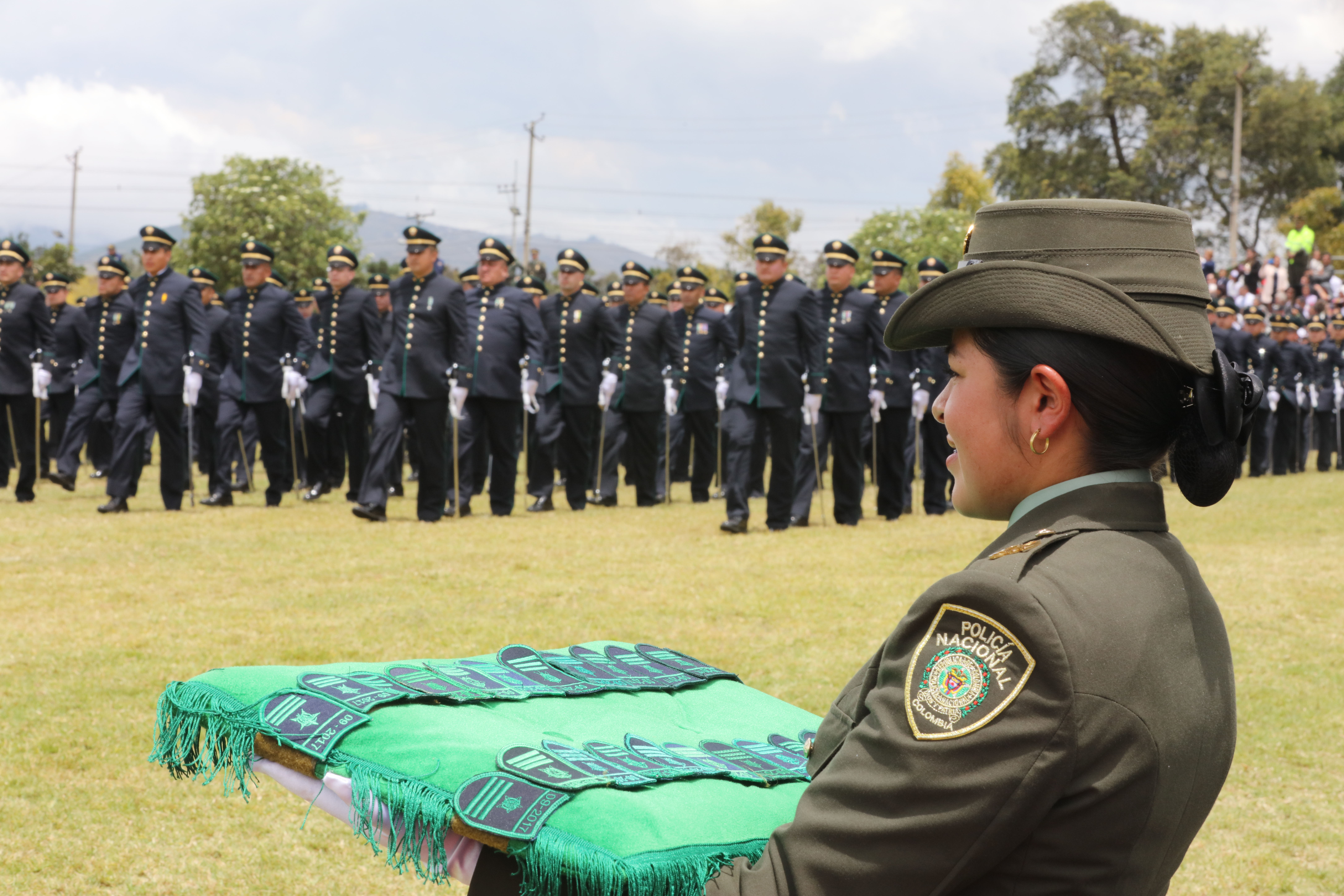 Ceremonia de ascenso Policía Nacional de Colombia